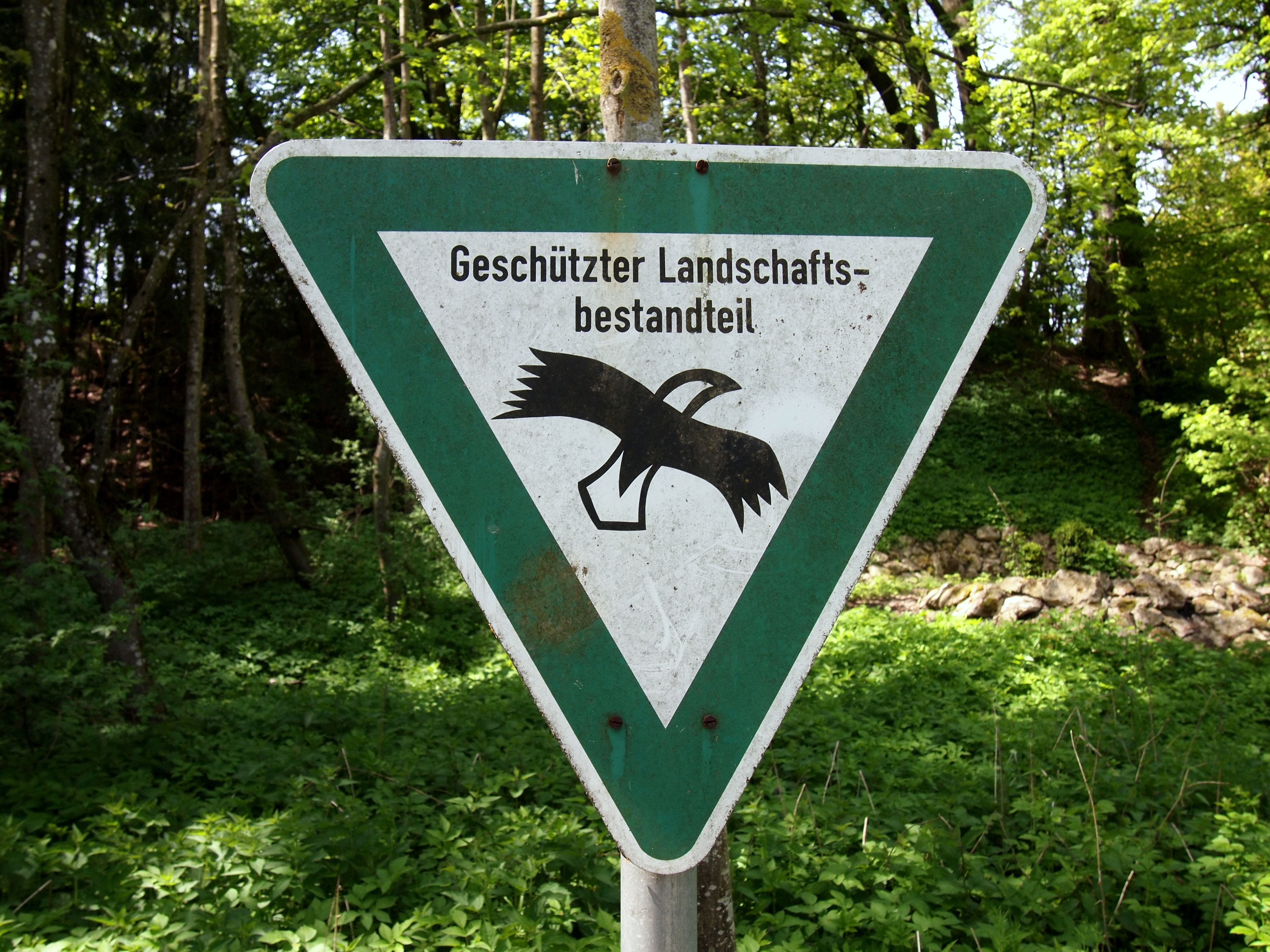 Schild: Geschützter Landschaftsbestandteil "Hanggehölzbestand mit Buche und Eiche bei der Grotte", 0,0945ha, Ausweisung 11.01.1989 gemäss KABI 1989 S. 17, bei Ettringen, Wertach